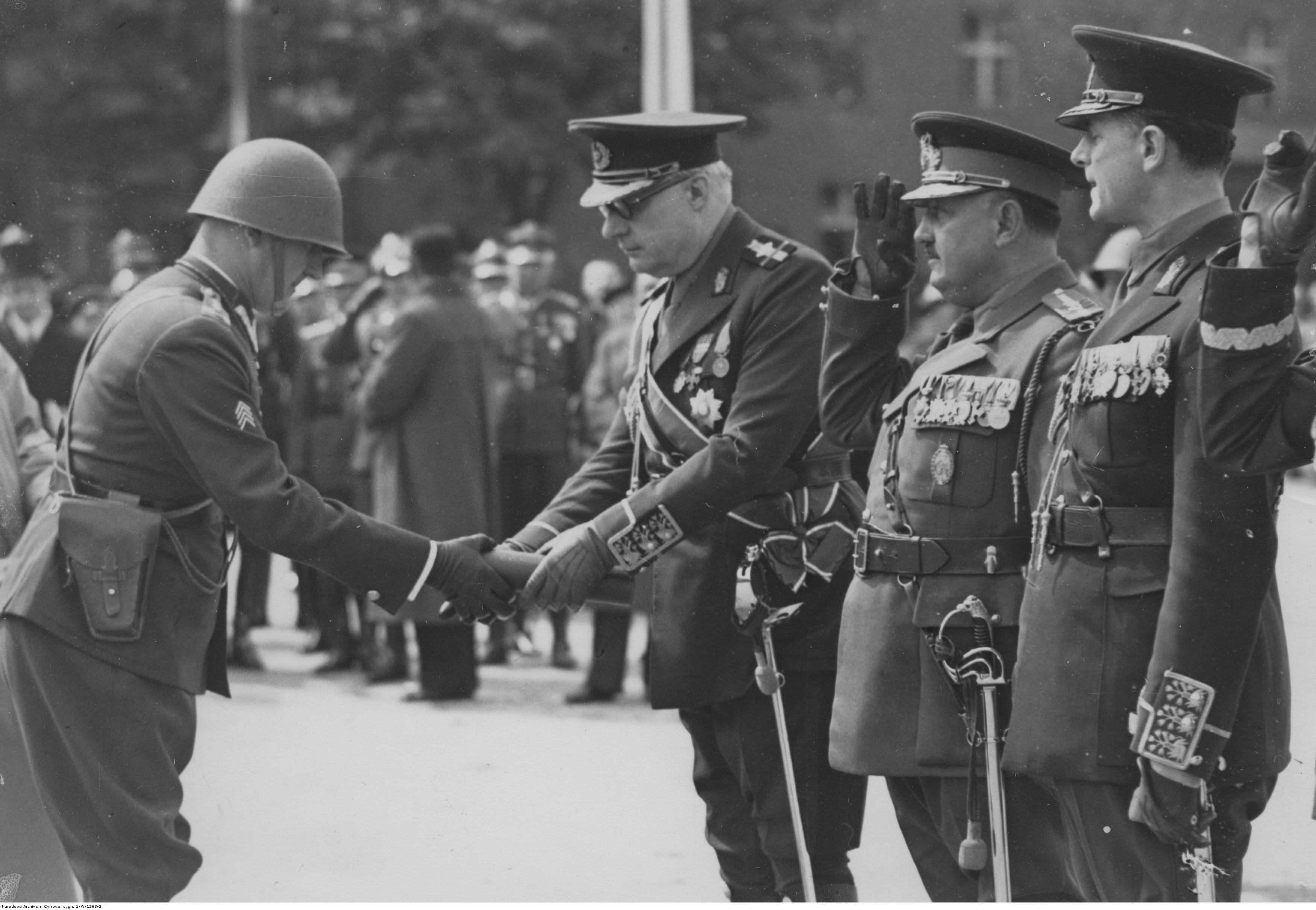 Święto 57 Pułku Piechoty im. Karola II Króla Rumunii w Poznaniu, maj 1939. Płk Tomasz Rybotycki wręcza ambasadorowi Richardowi Franassovici odznakę pułkową. Widoczni także rumuńscy pułkownicy: Polemon i Crisias. Koncern Ilustrowany Kurier Codzienny - Archiwum Ilustracji. Sygnatura: 1-W-1263-2